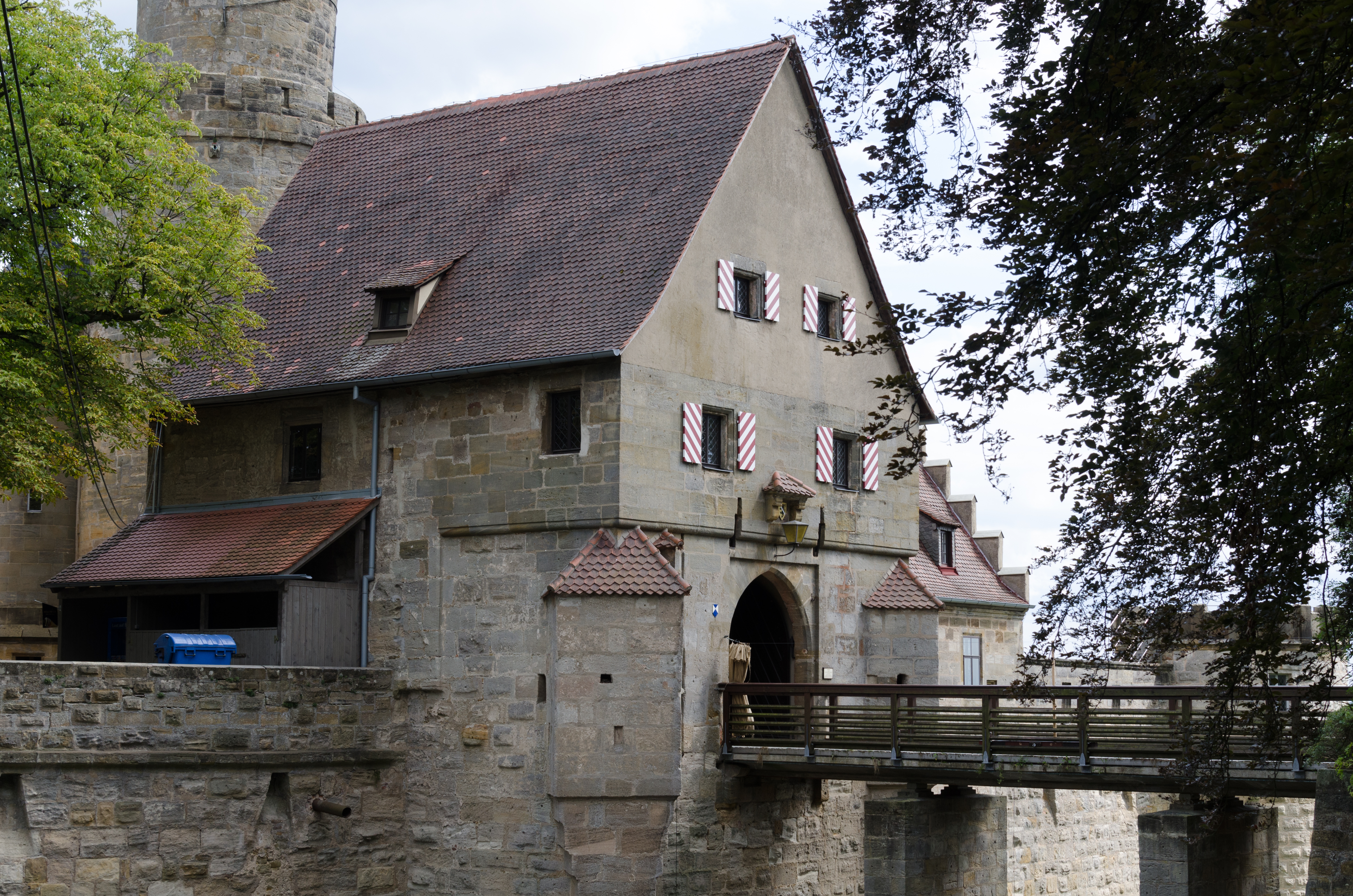 Bamberg, Altenburg